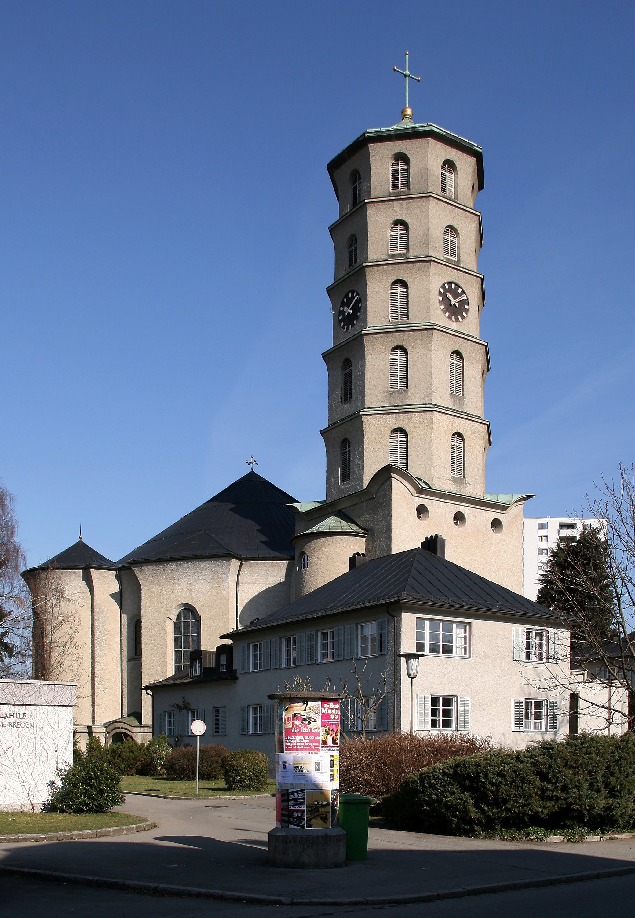 aus dem DEHIO Vorarlberg 1983: Ecke Clemens-Holzmeistergasse - Mariahilfstrassse Nr. 50+52: Pfarrgebäude und Pfarrkirche Mariahilf (Heldendankkirche) in Rieden, Vorkloster. Nach Planungsbeginn 1921 durch Clemens Holzmeister 1925-1931 erbaut. *** In Bregenz, Vorarlberg.